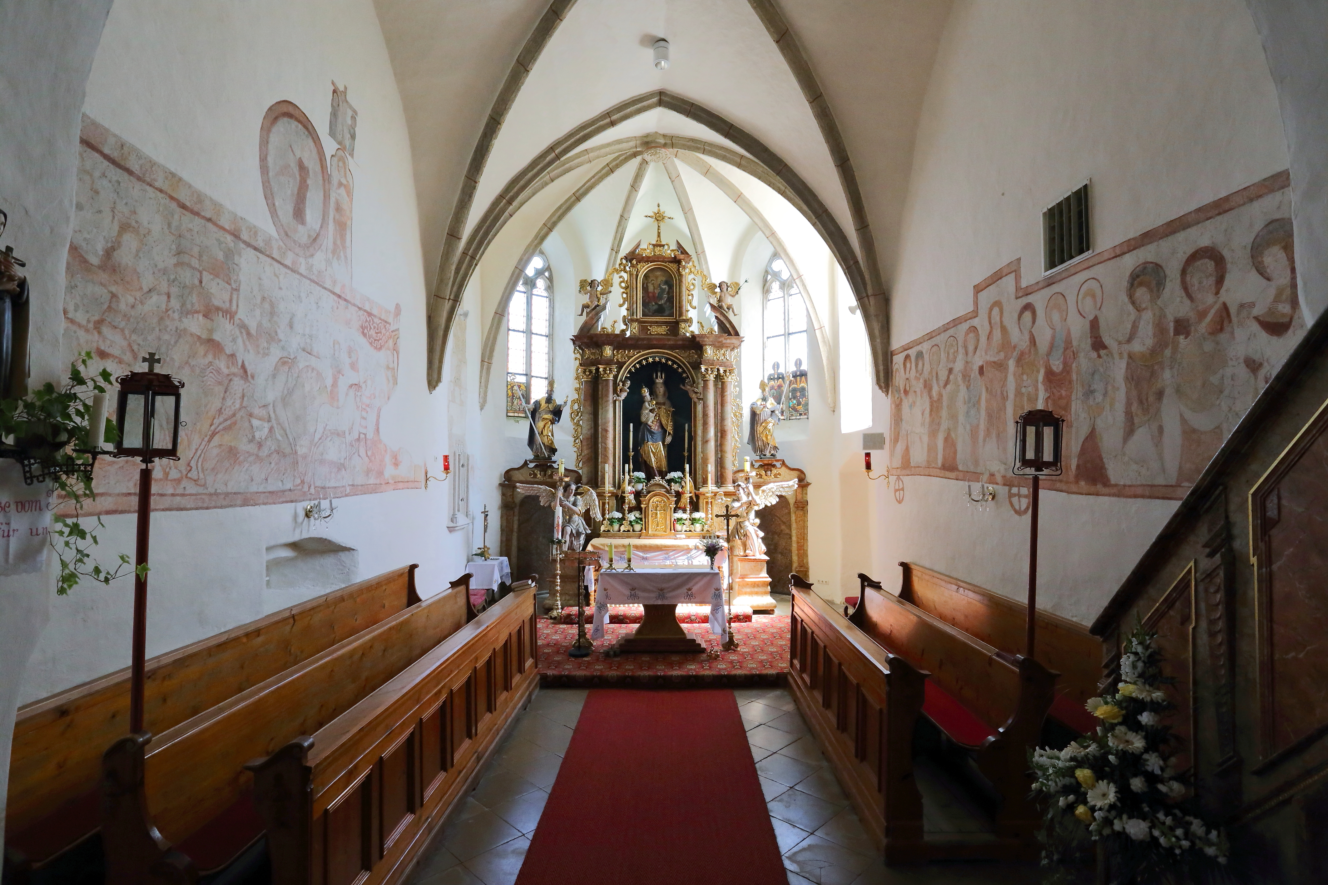 Hochaltar und Chorraum mit den freigelegten Wandmalereien der katholischen Pfarrkirche Mariae Himmelfahrt in Neukirchen am Ostrong, ein Ortsteil der niederösterreichischen Marktgemeinde Pöggstall.